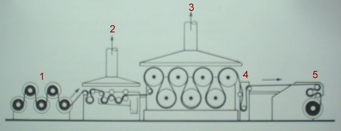 Schematische Darstellung einer Schlichtmaschine